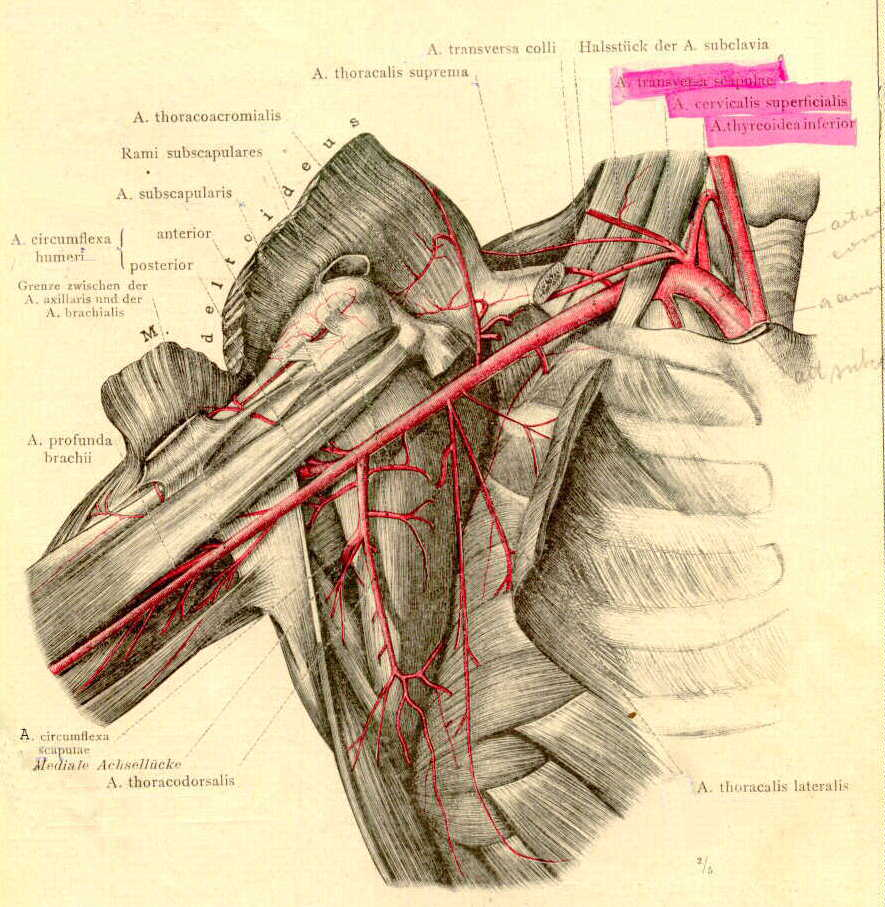 A hónalj ütőereinek anatómiai ábrázolása